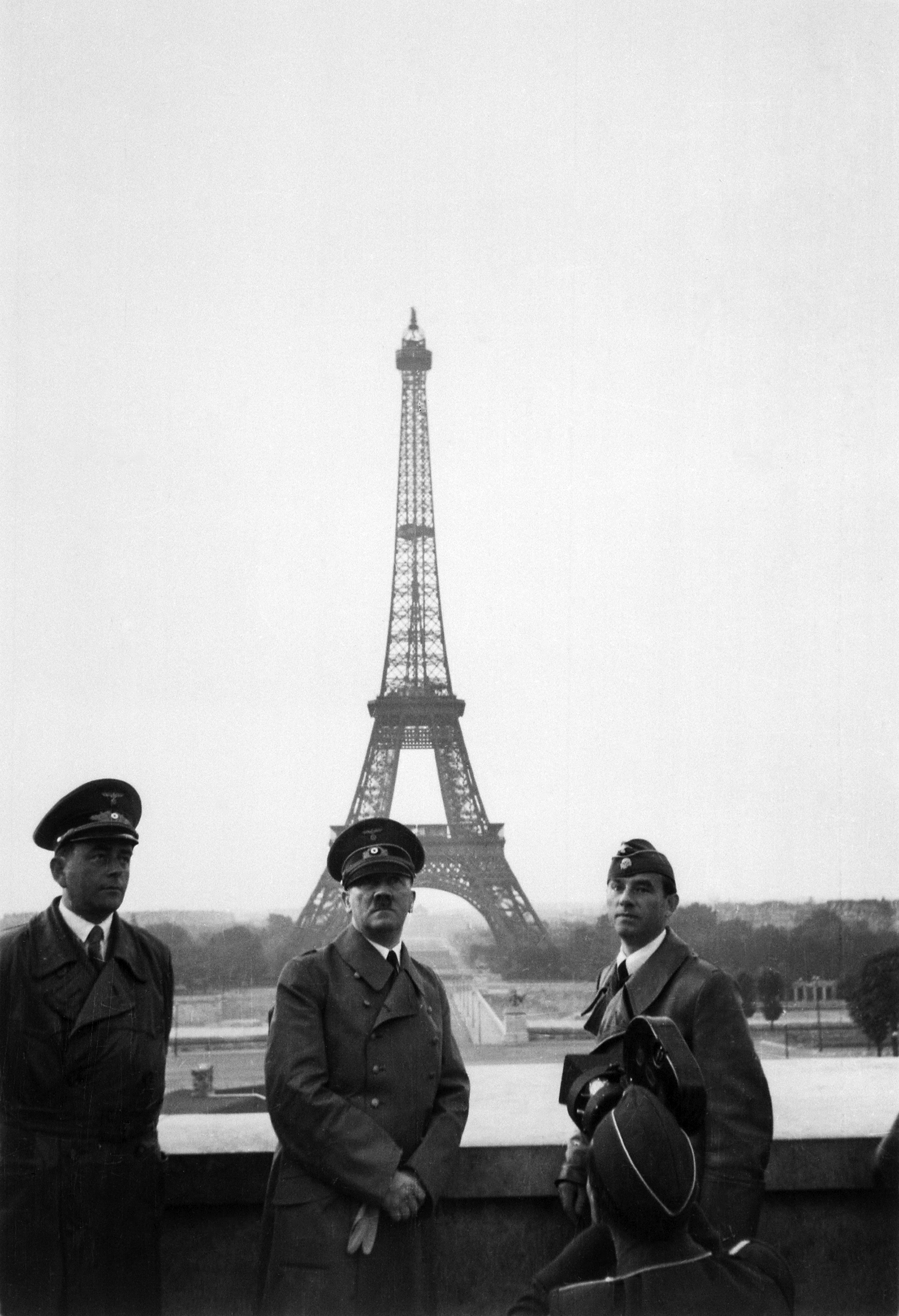 Scope and content